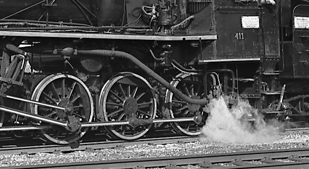 Eksosdampinjektor i bruk på NSB 26c 411.